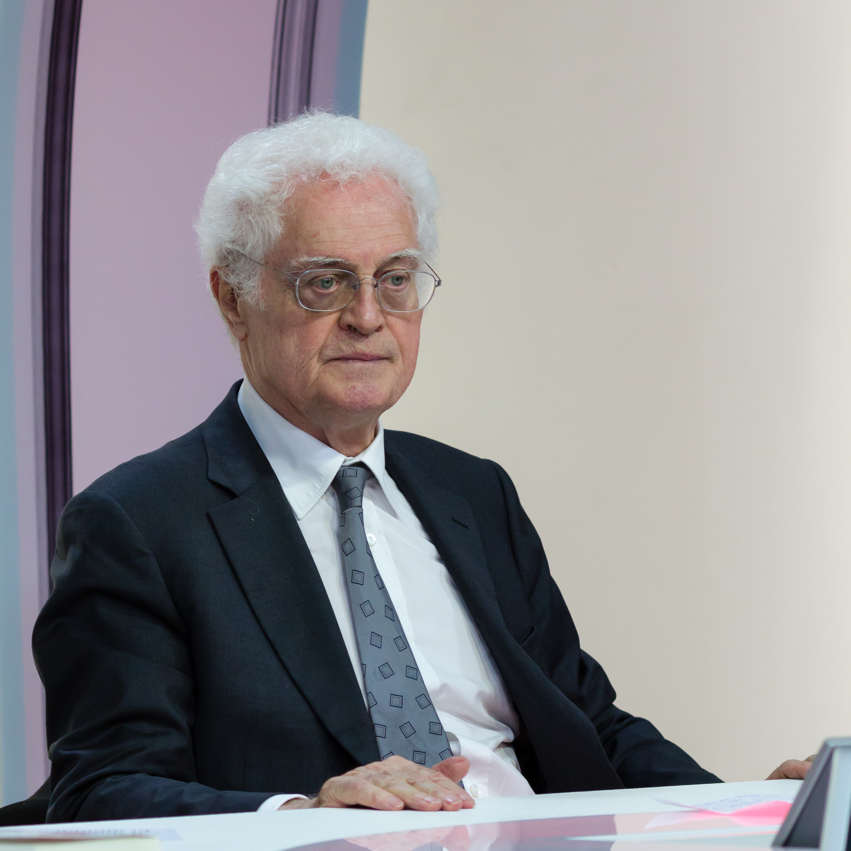 Lionel Jospin en conférence à l'espace Ouest-France de Rennes le 14 mai 2014 pour la présentation de son livre « le mal napoléonien. »